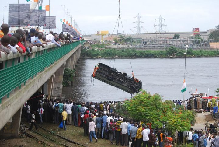 Tragédie sur Le Pont Félix Houphouet Boigny 5 aout 2011( 2)